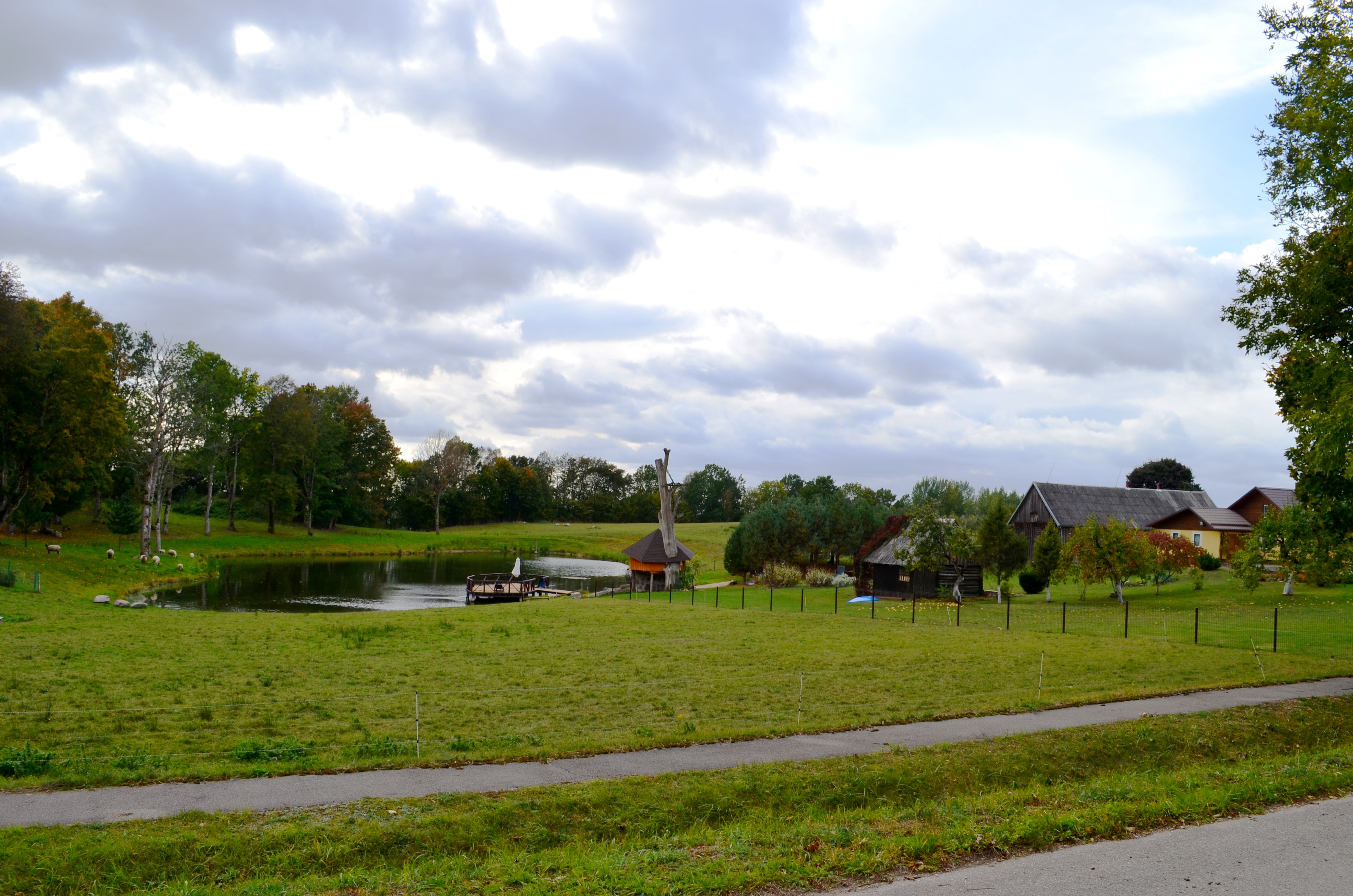 Lingėnai, Telšių raj.